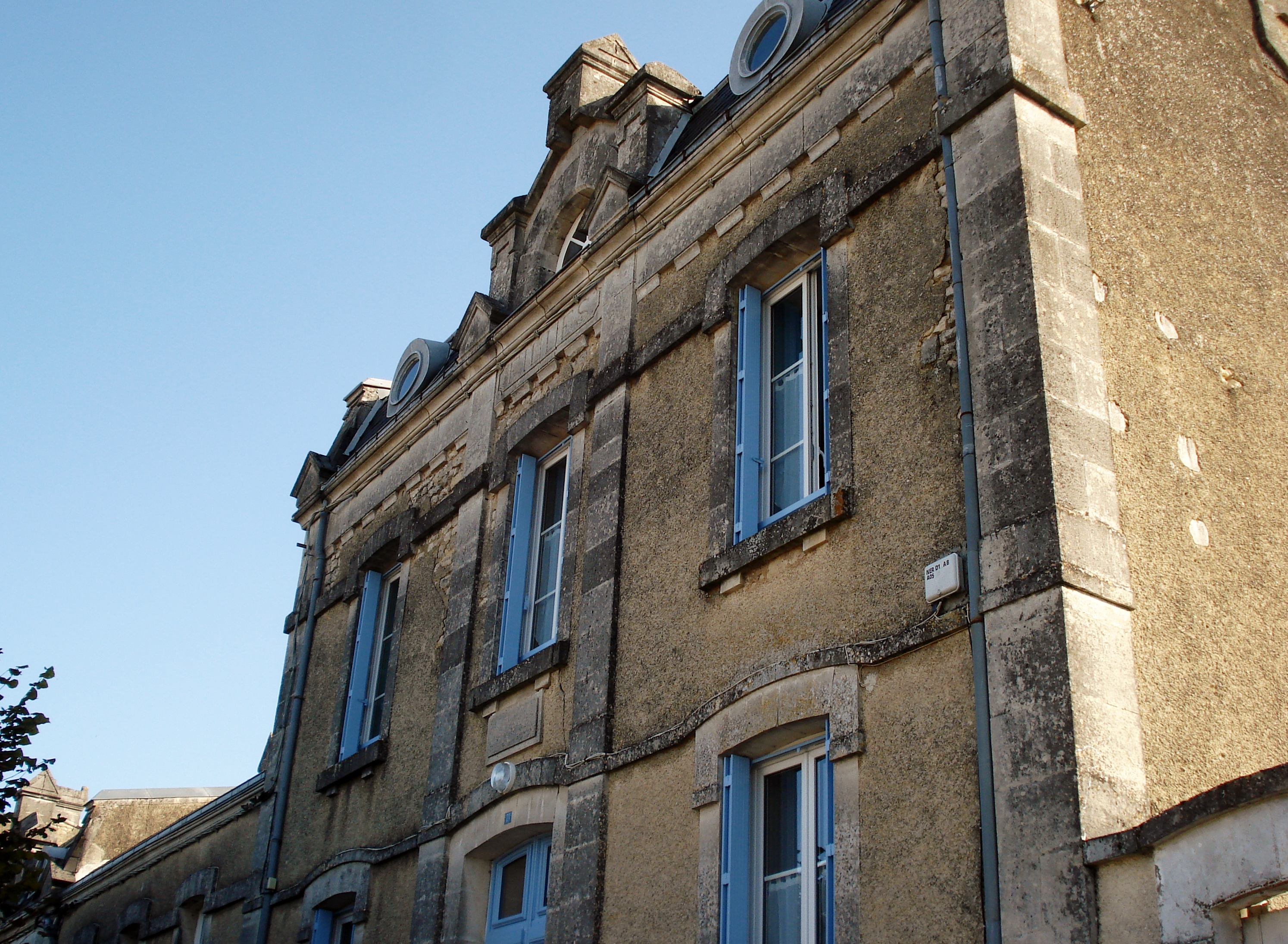 Mairie de Loiré-sur-Nie en Charente-Maritime